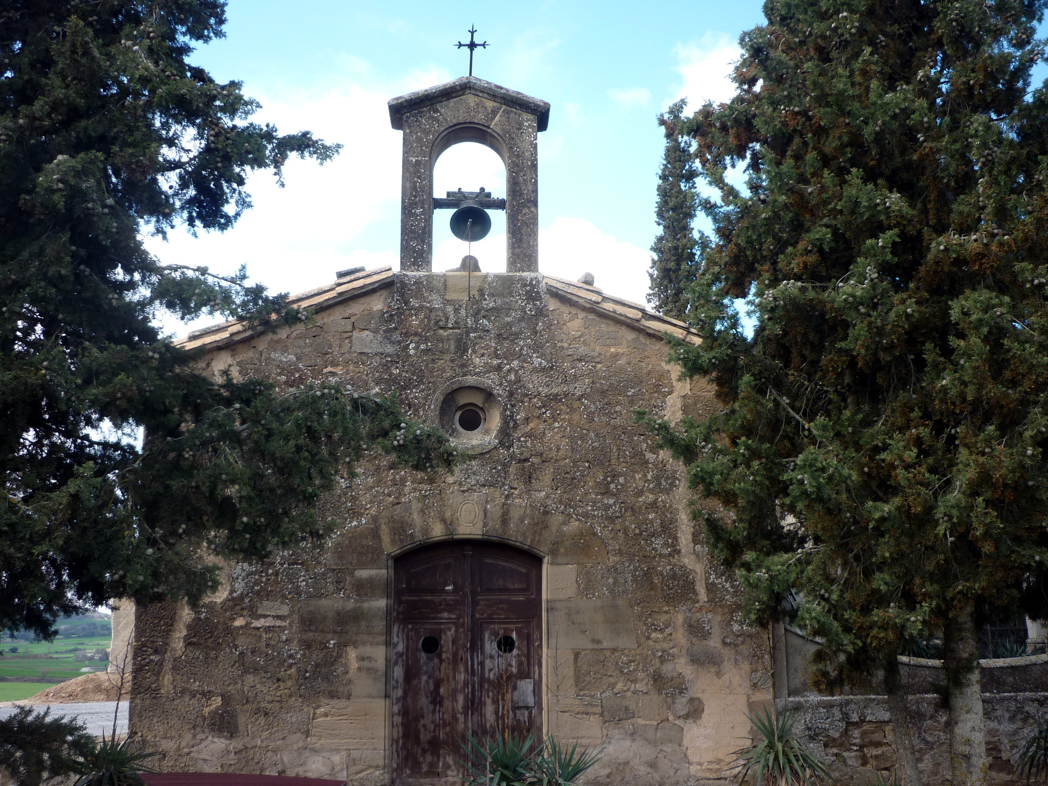 Sant Vicenç de mas Mascó de Selvanera (Torrefeta i Florejacs)